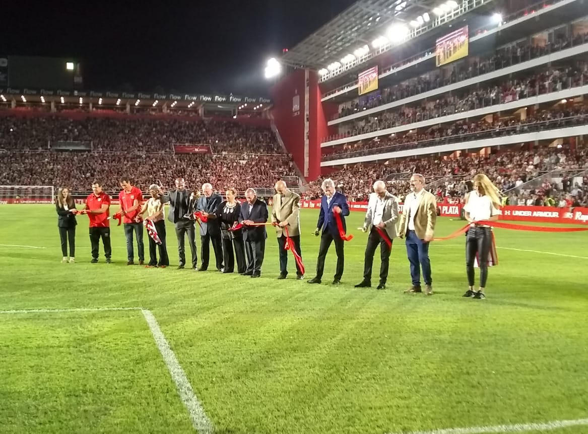 Ceremonia de corte de cinta celebrada entre distintos dirigentes históricos del Club Estudiantes de La Plata, durante la reinauguración del Estadio Jorge Luis Hirschi, propiedad de la institución, el 9 de noviembre de 2019.